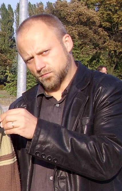 Dariusz Basiński (ur. 5 maja 1967) - polski aktor filmowy i teatralny oraz artysta kabaretowy.